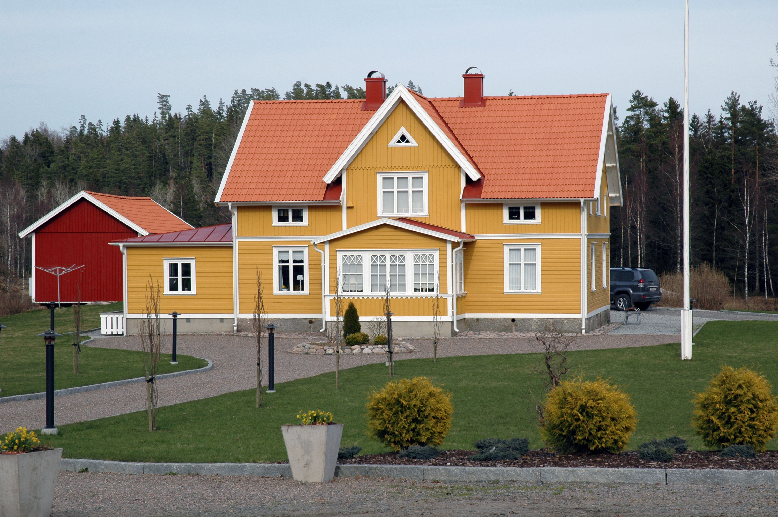 Ammarp, Hakarp, Sverige